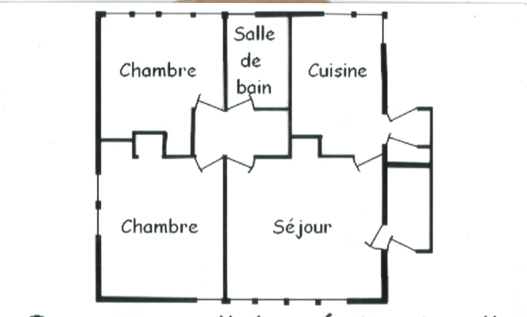 Plan d'aménagement d'un UK100